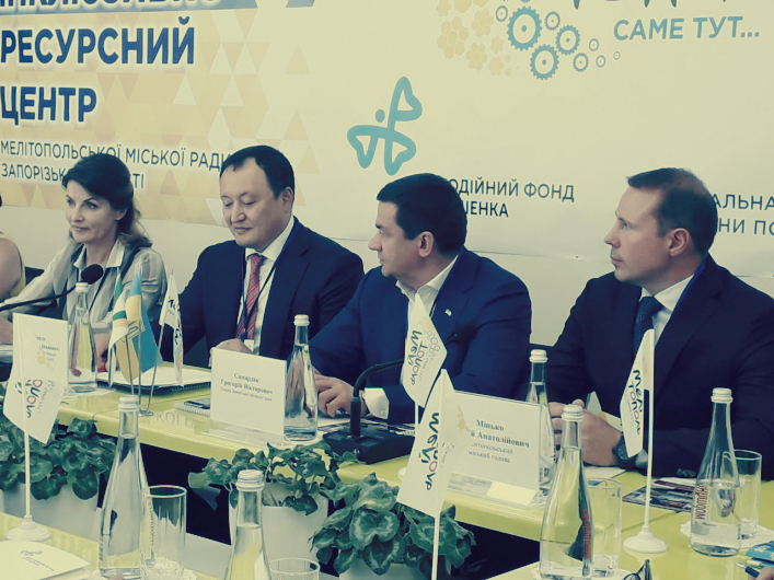 Марина Порошенко, Константин Брыль, Григорий Самардак, Сергей Минько